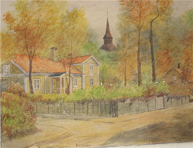 Fresk av Einar Hillberg föreställande Komminestergården i Fors församling, Eskilstuna. En av de fresker som Einar Hillberg målade i sin sons, Ove Hillbergs, nybyggda hus i Eskiltuna 1953.